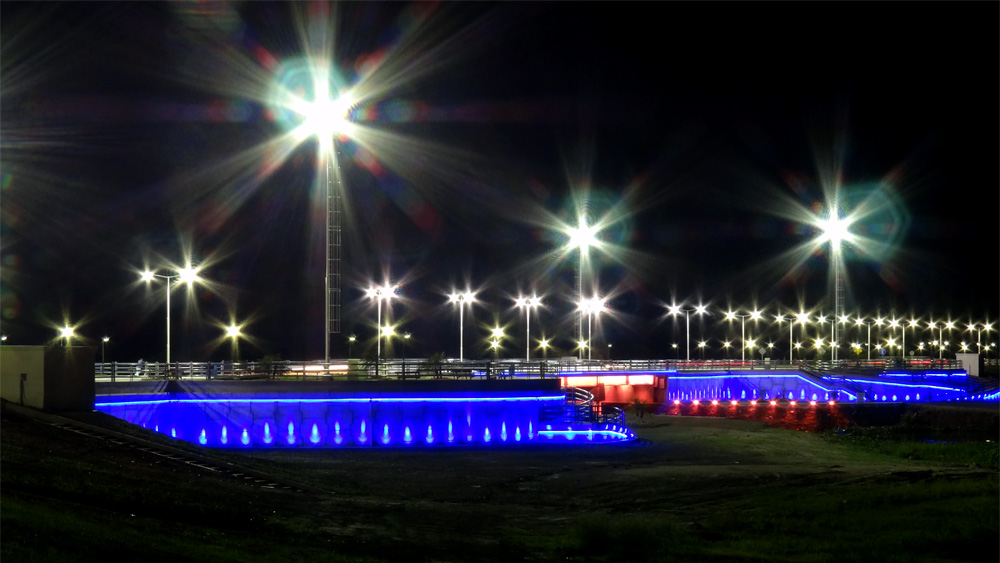 Puente sobre el Riacho Formosa en la Costanera de Formosa